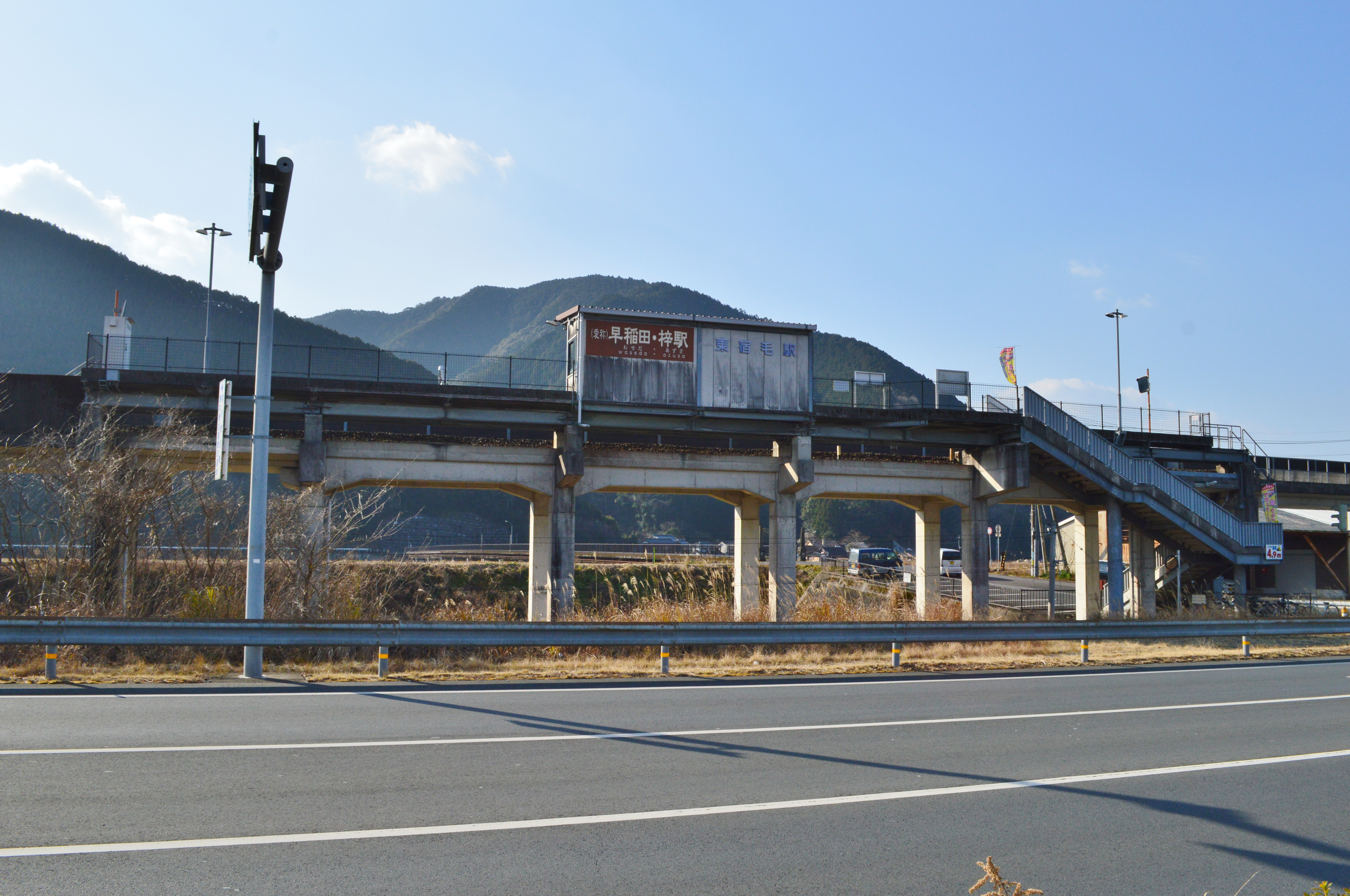 東宿毛駅 全景